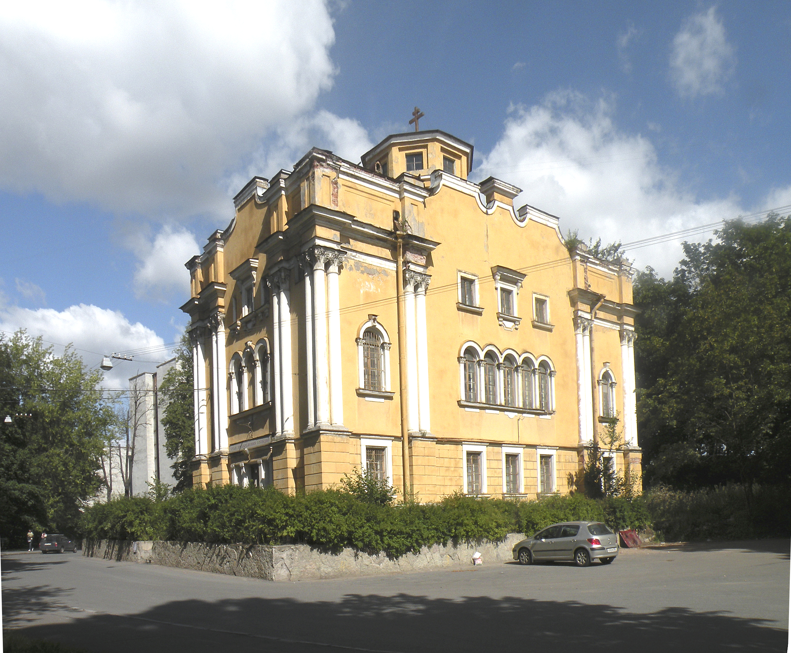 Церковь Преображения Господня при Лейб-гвардии гренадерском полку. Построена по проекту К. А. Тона в 1840-45 гг. Закрыта 15 апреля 1930 и частично перестроена. [1]